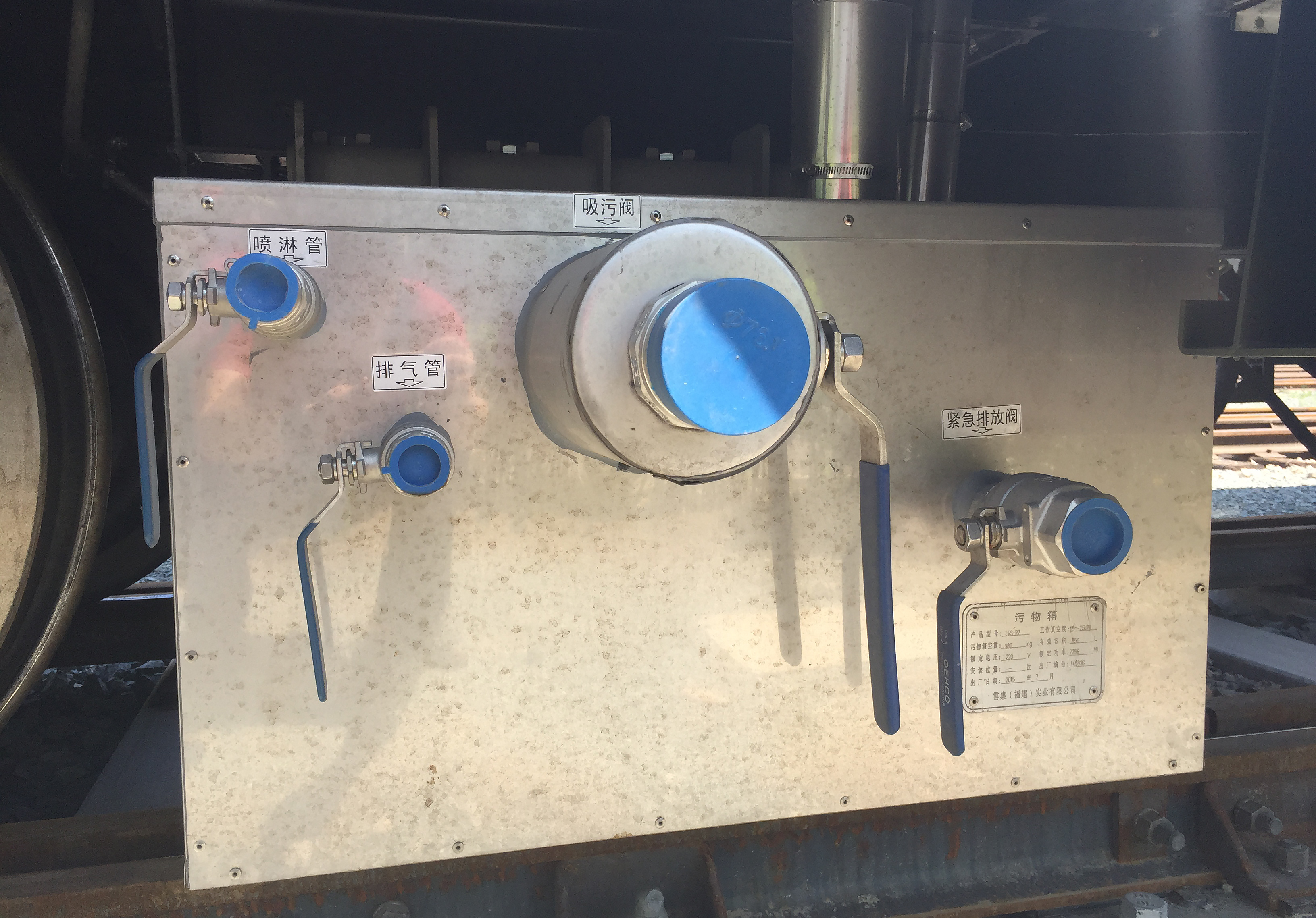 某辆25T型客车的真空集便器